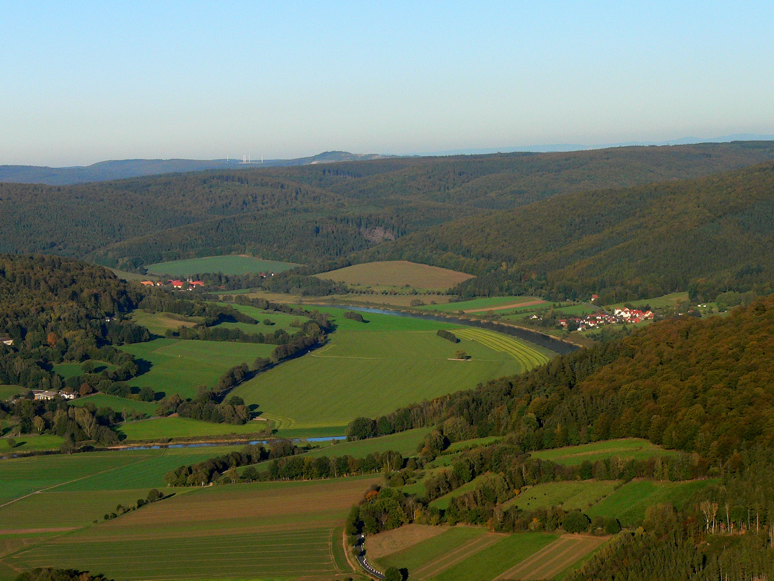 Weserschleife mit den Orten Glashütte (vorne) und Kloster Bursfelde, Hessen, Deutschland. Aufnahme aus einem Heißluftballon.